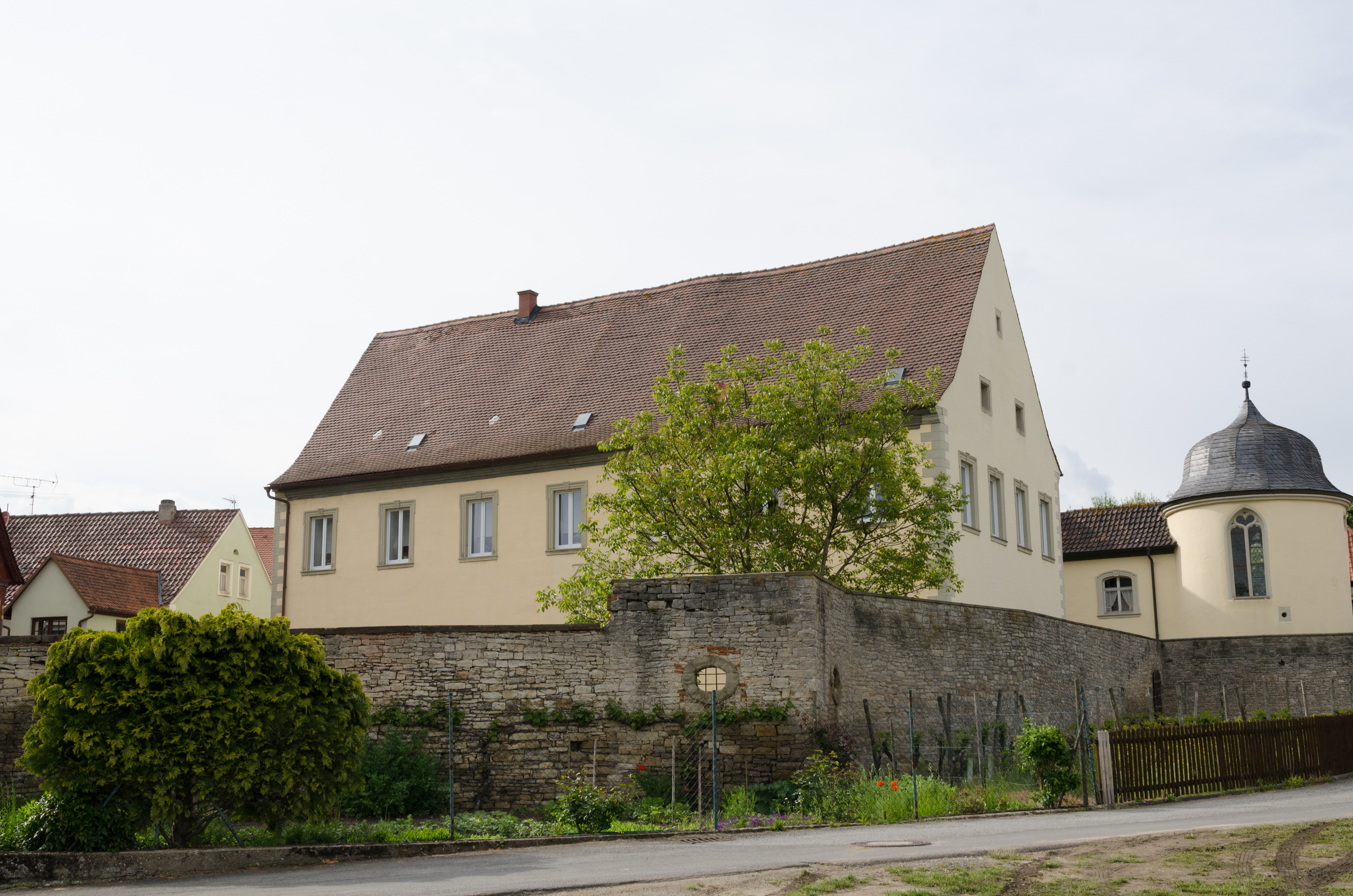 Sommerach, Hauptstraße 17